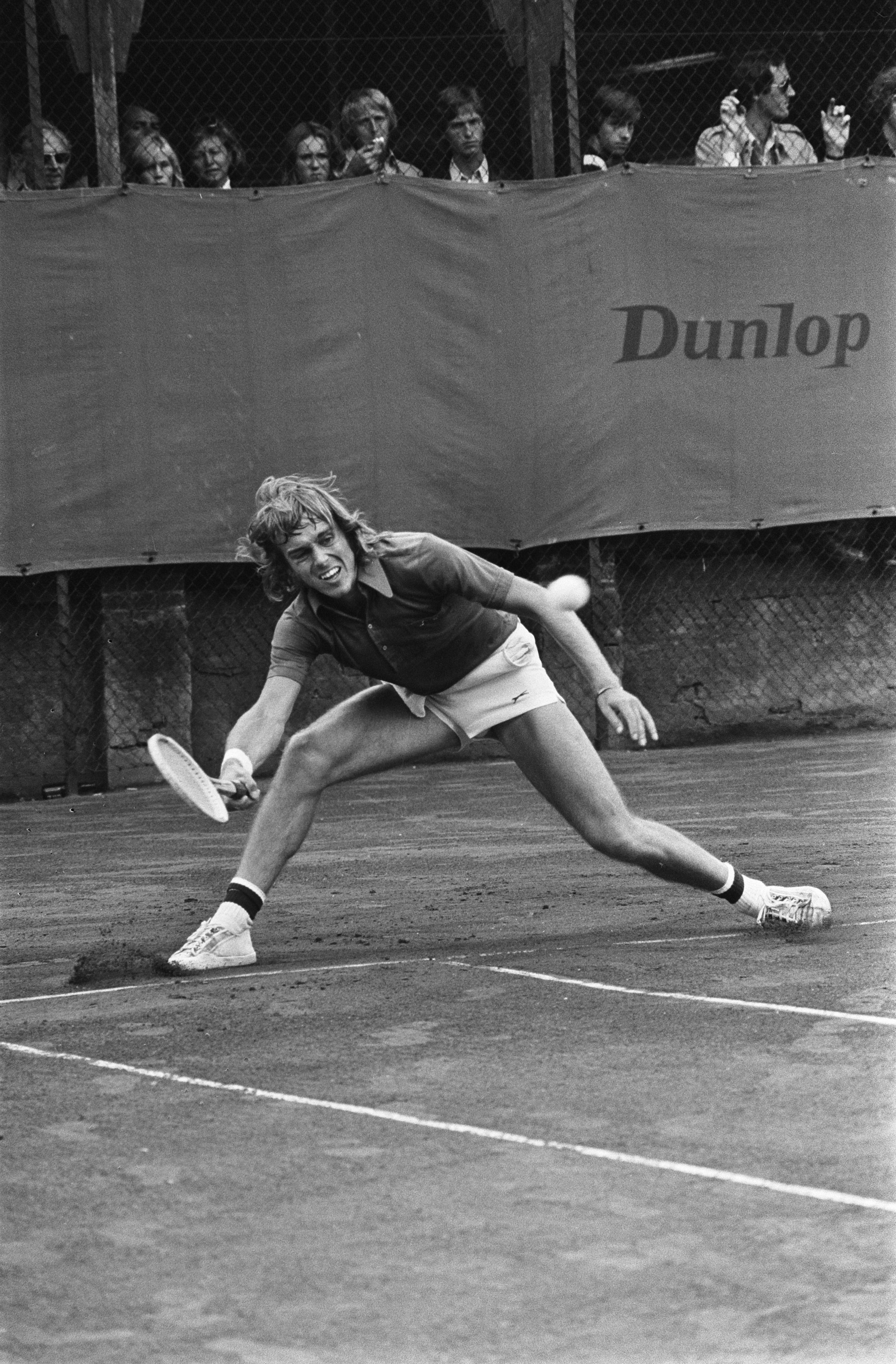 Collectie / Archief : Fotocollectie Anefo Reportage / Serie : Internationale tenniskampioenschappen 1975 op het Melkhuisje in Hilversum Beschrijving : Lloyd (UK) in aktie Datum : 16 juli 1975 Locatie : Hilversum, Melkhuisje, Noord-Holland Trefwoorden : tennis, toernooien Persoonsnaam : Lloyd, John Instellingsnaam : Melkhuisje, 't Fotograaf : Bert Verhoeff / Anefo Auteursrechthebbende : Nationaal Archief Materiaalsoort : Negatief (zwart/wit) Nummer archiefinventaris : bekijk toegang 2.24.01.05 Bestanddeelnummer : 928-0521